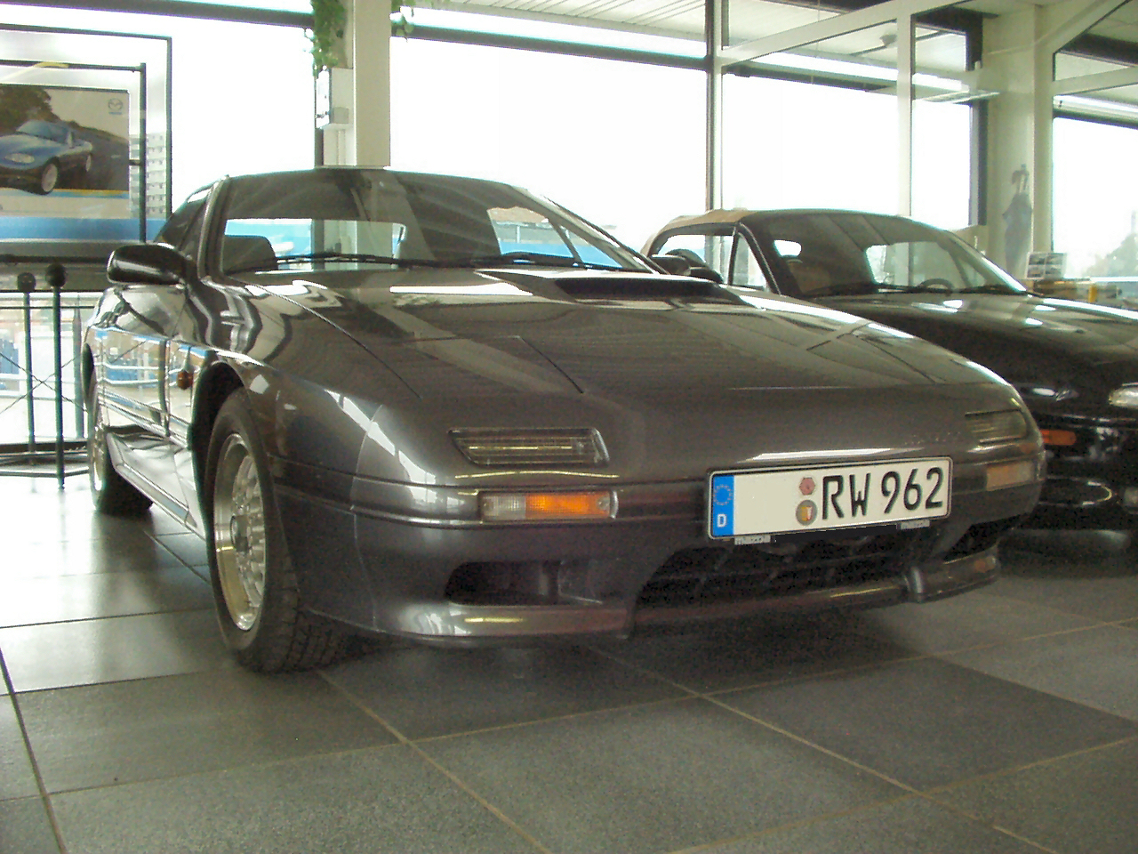 Mazda RX 7